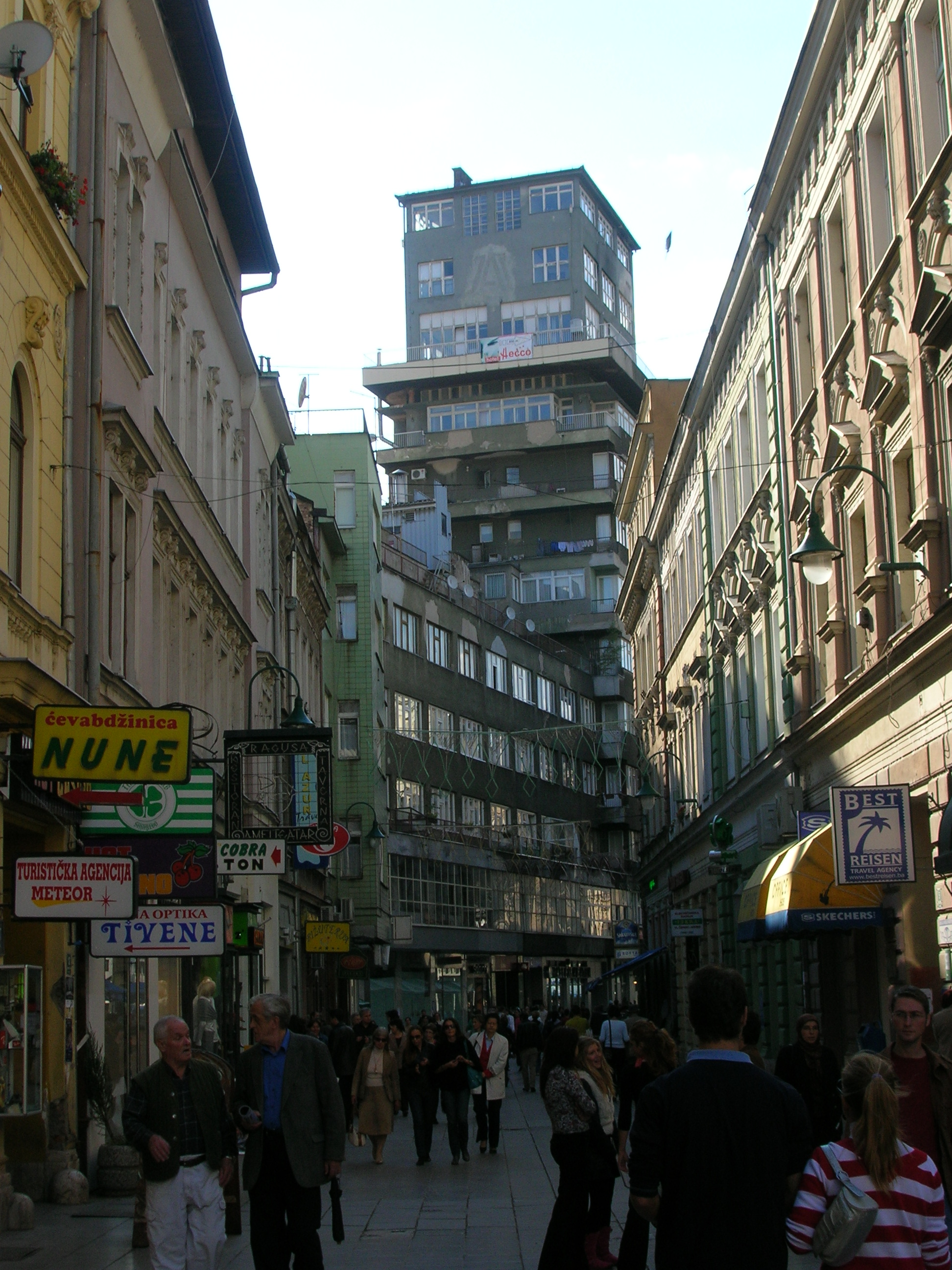 Ferhadija